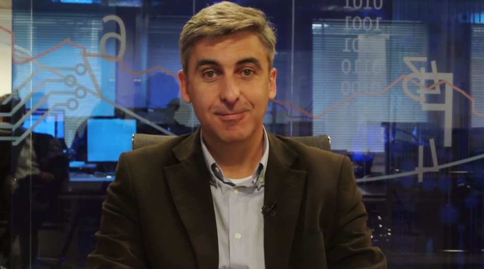 Entrevista con David Ortega, de UPyD.